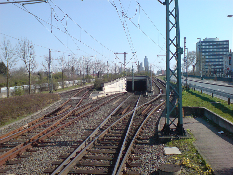 Rampe der U-Bahnstrecke C, Breitenbachbrücke, Frankfurt-Bockenheim